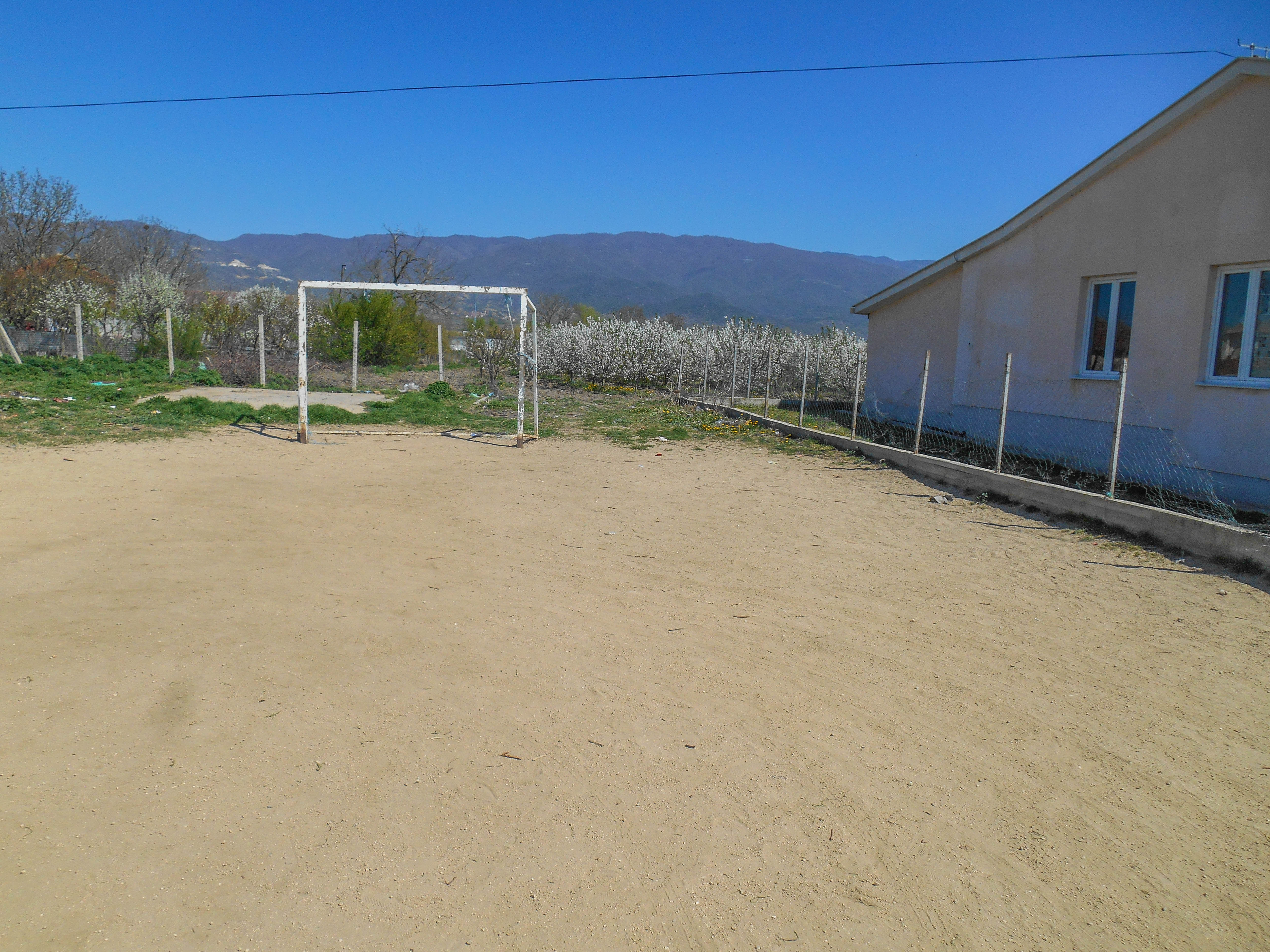 Основно училиште „Гоце Делчев“ - Старо Балдовци